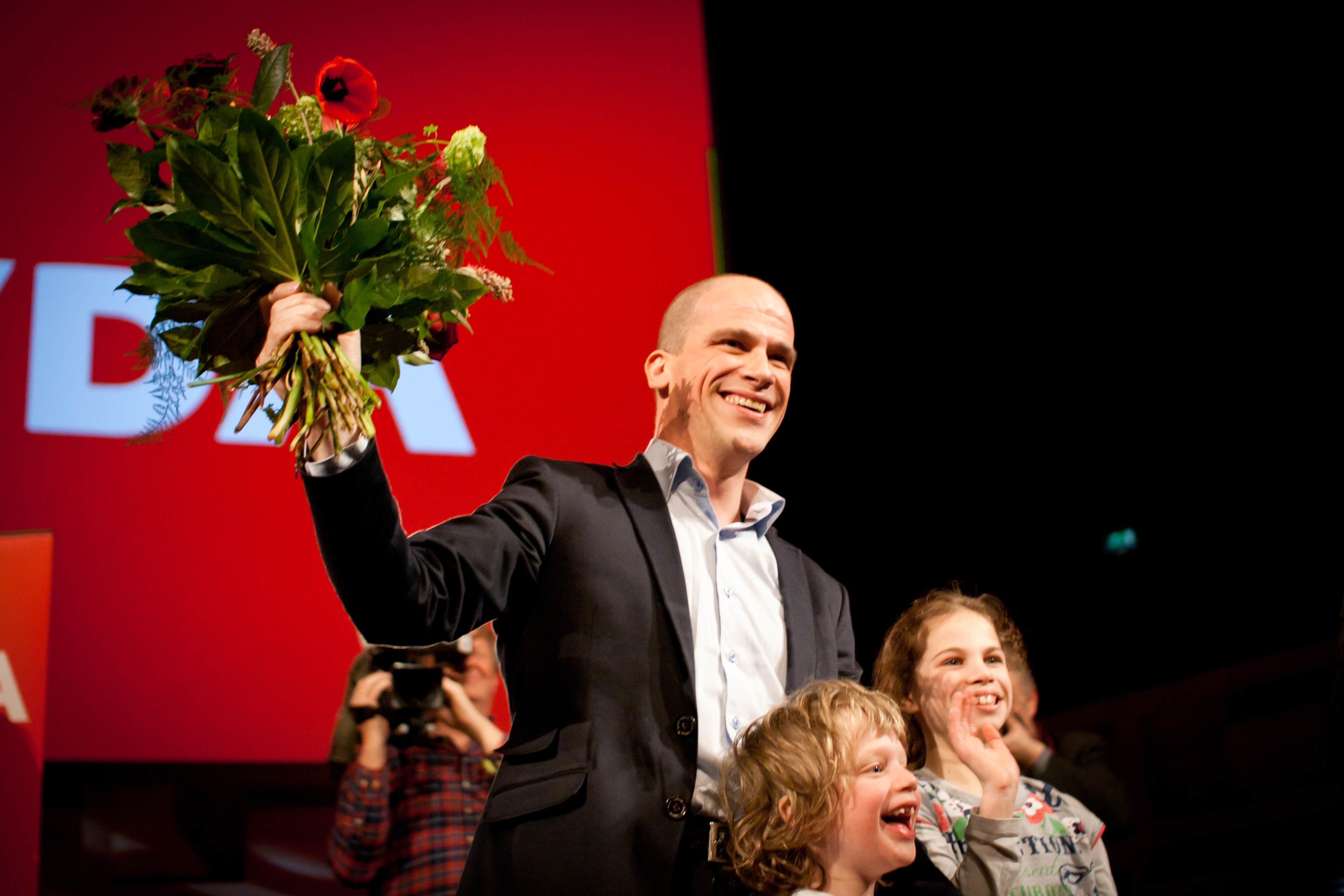 Diederik Samsom elected as party leader; Diederik Samsom gekozen tot partijleider van de PvdA